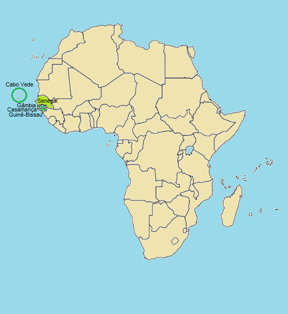 Português do Brasil: Localização dos crioulos da Alta Guiné